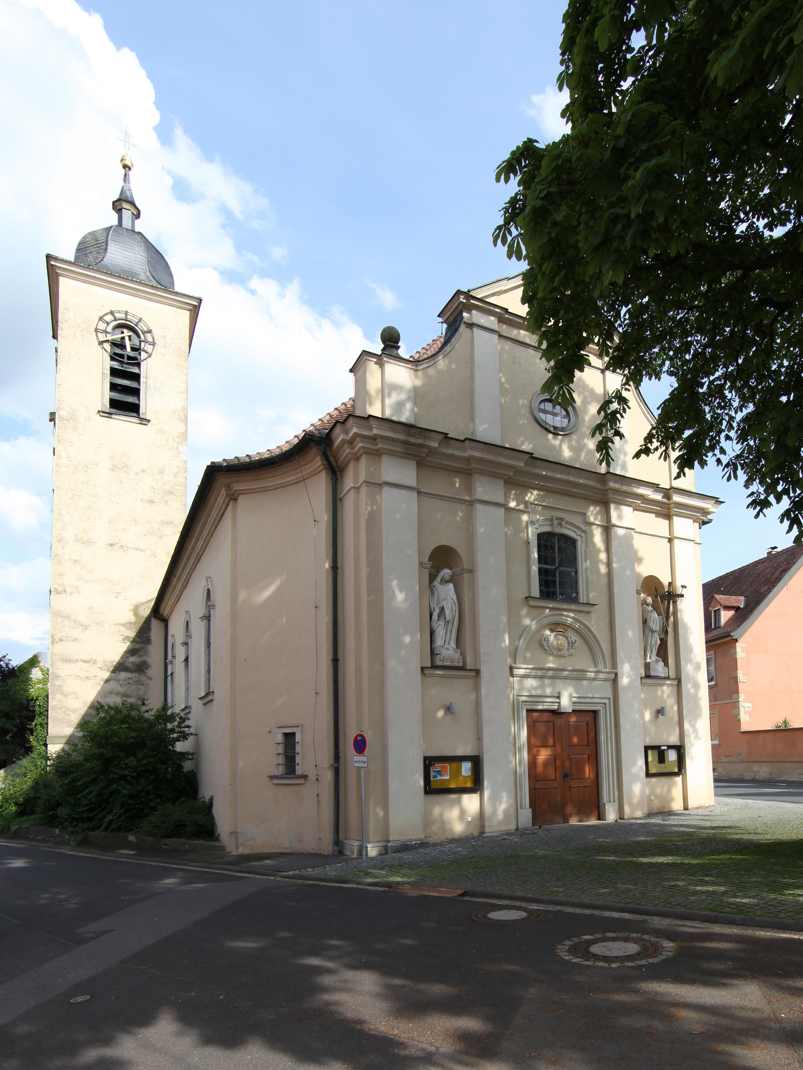 Katholische Kirche St. Aegidius in Sulzheim, Bayern